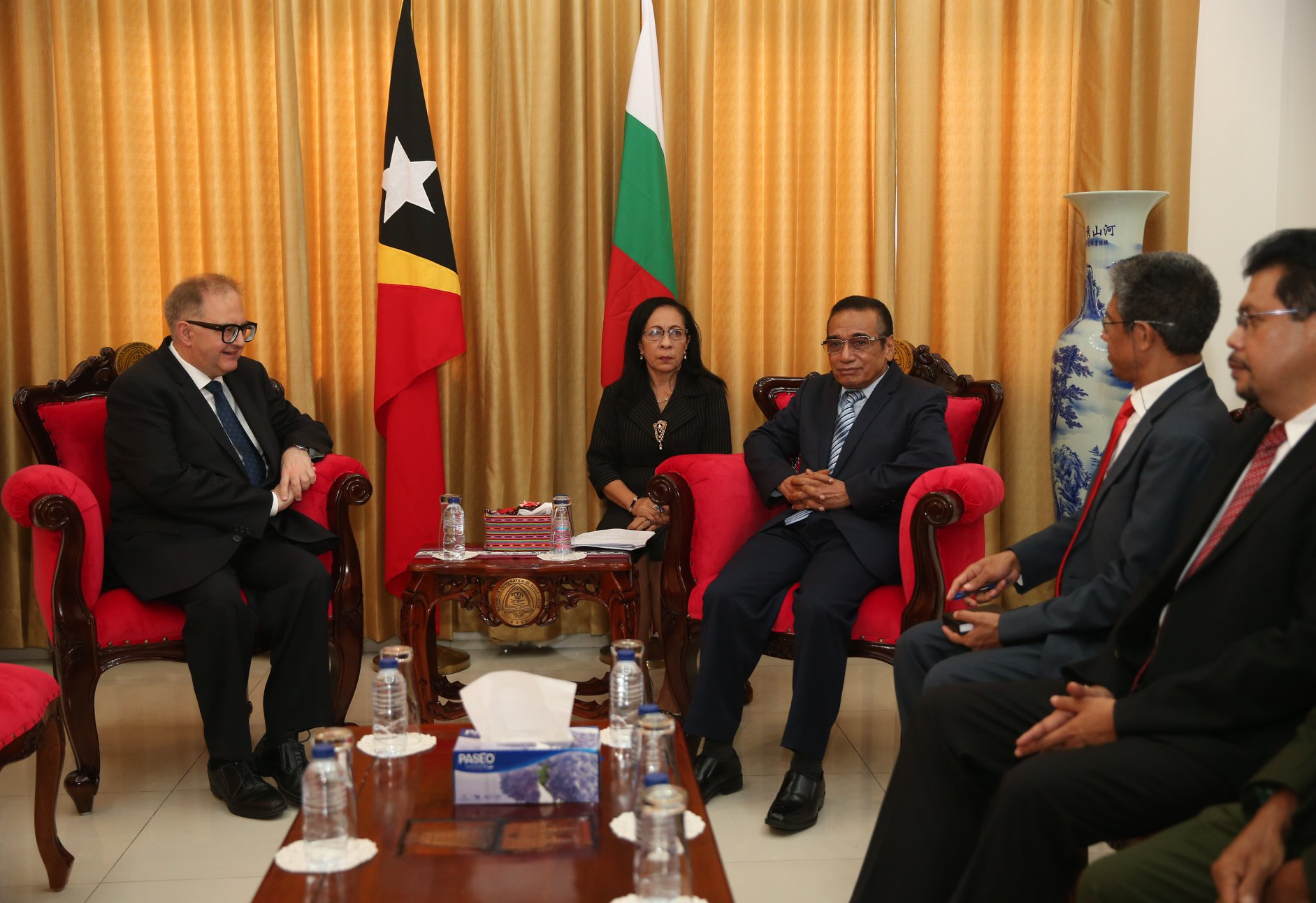 Peter Andonov, bulgarischer Botschafter in Osttimor, am Tag der Übergabe seiner Akkreditierung, mit Staatspräsident Francisco Guterres